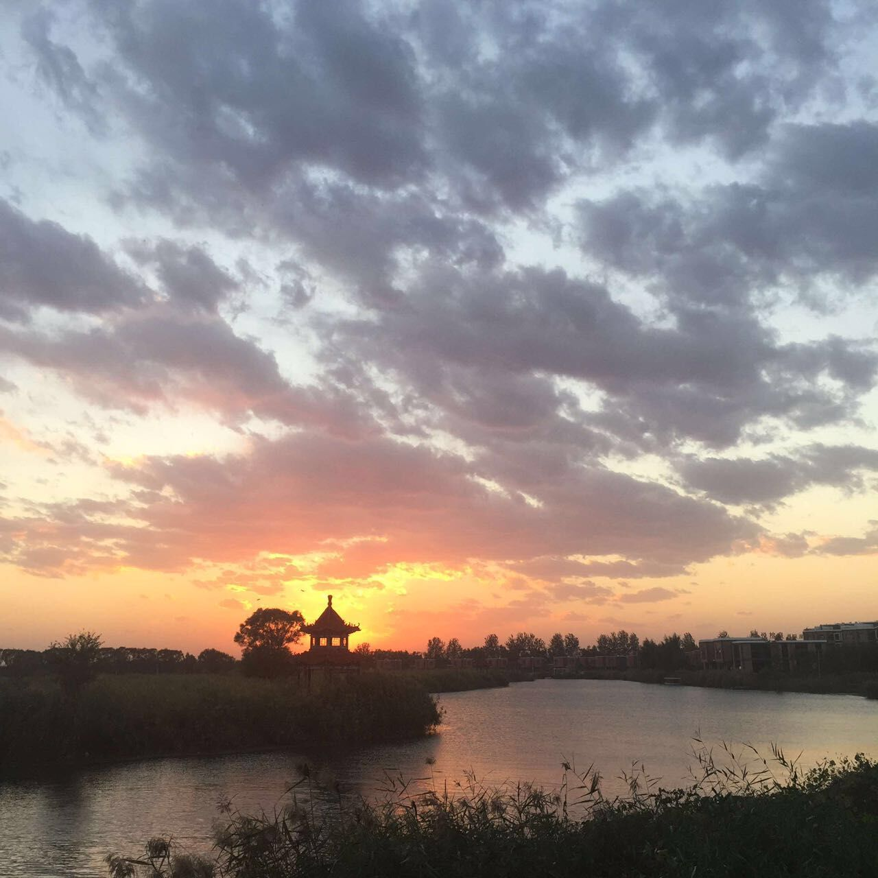 中文（中国大陆）: 拍摄于雄安新区白洋淀景区